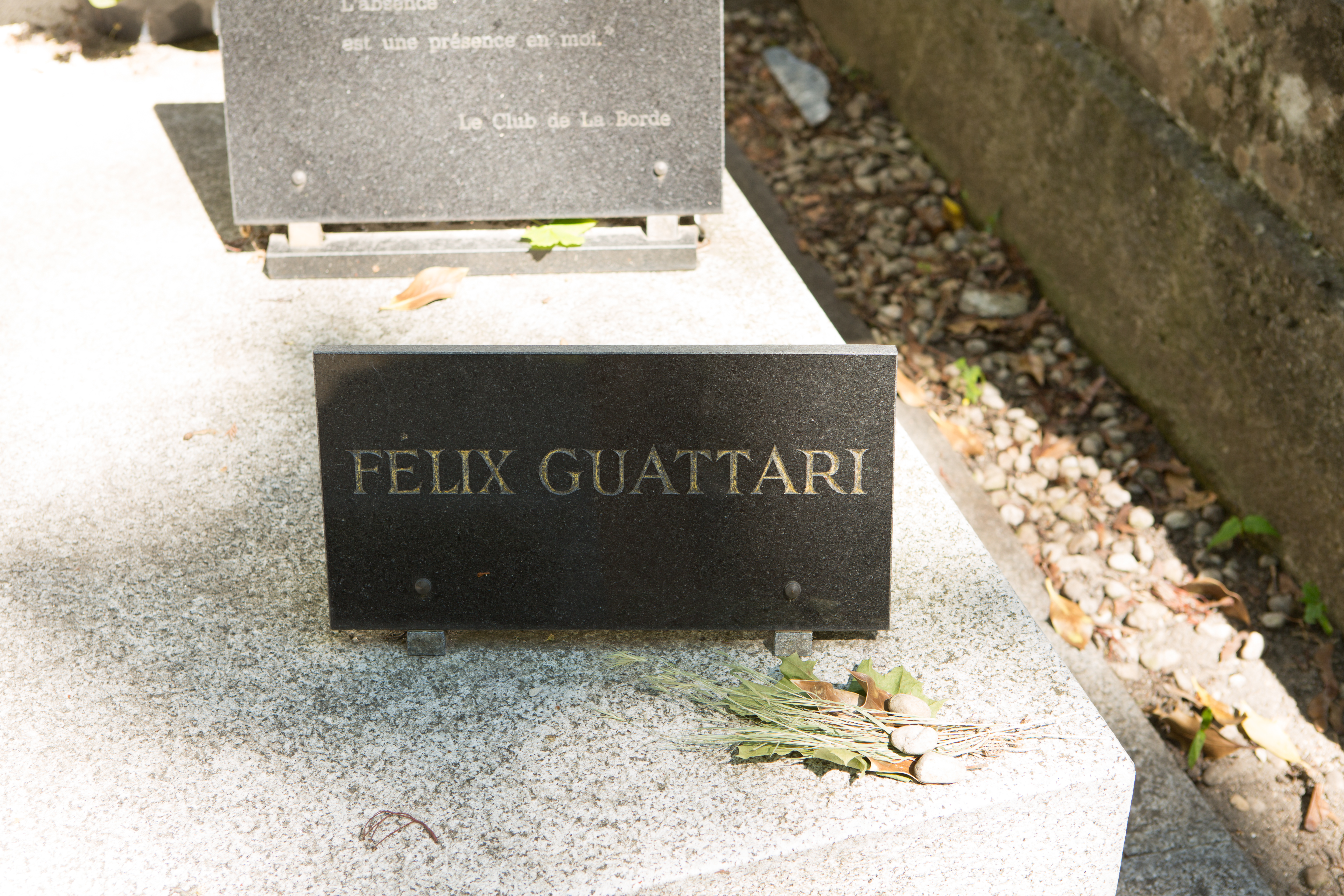 Sépulture de Félix Guattari (1930-1992), psychanalyste et philosophe.